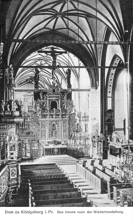 Das Dominnere nach der Restaurierung 1908